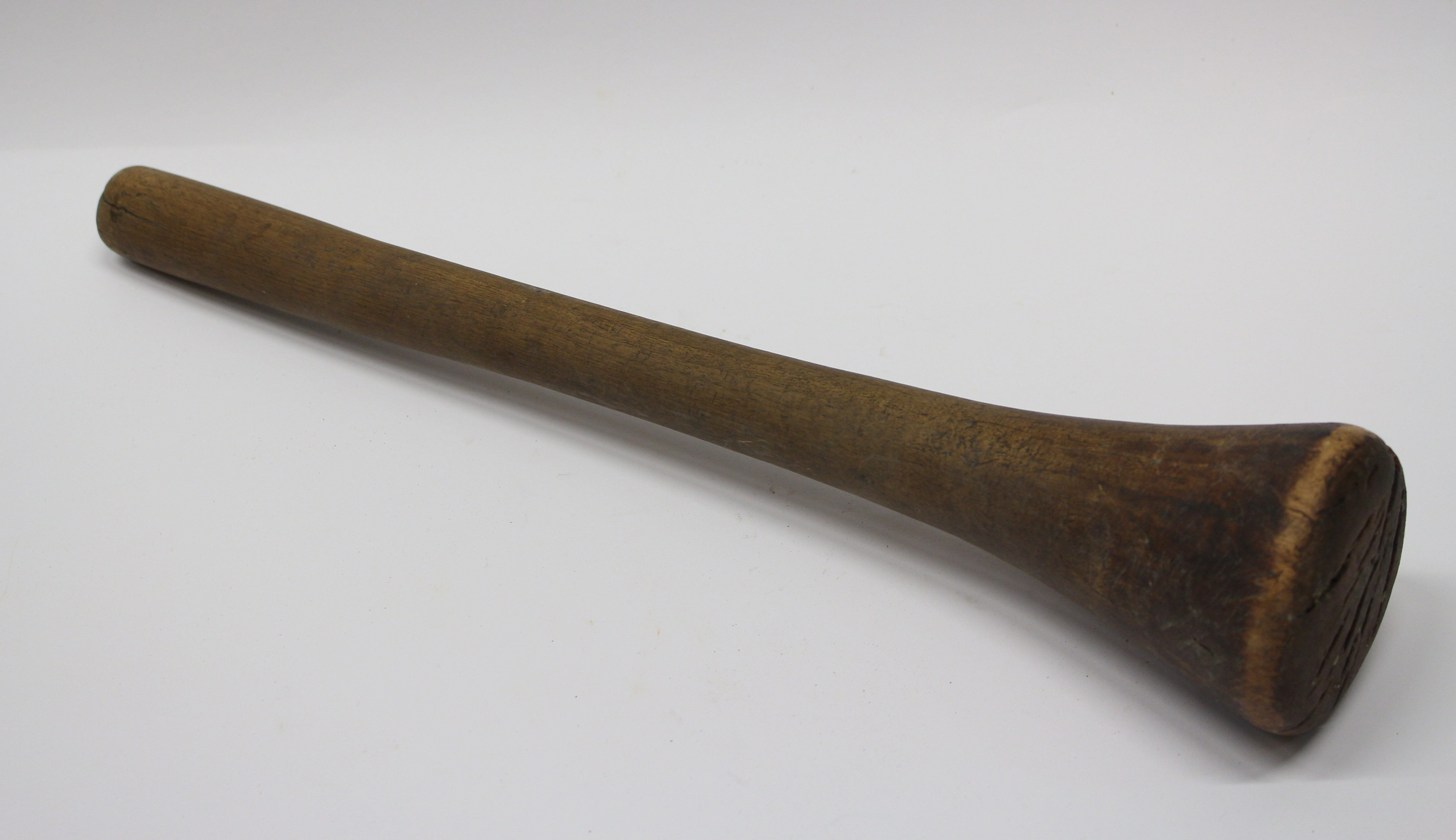 Pärit Keila Kooli Muuseumi kogust. Keila Kooli õpetaja Linda Ardve (õpetas koolis 1950-1972) eestvedamisel hakati koolimuuseumi jaoks vanu esemeid koguma. Õpilastele anti ülesandeks tuua kodust muuseumisse kõige vanem ese. (eesti)